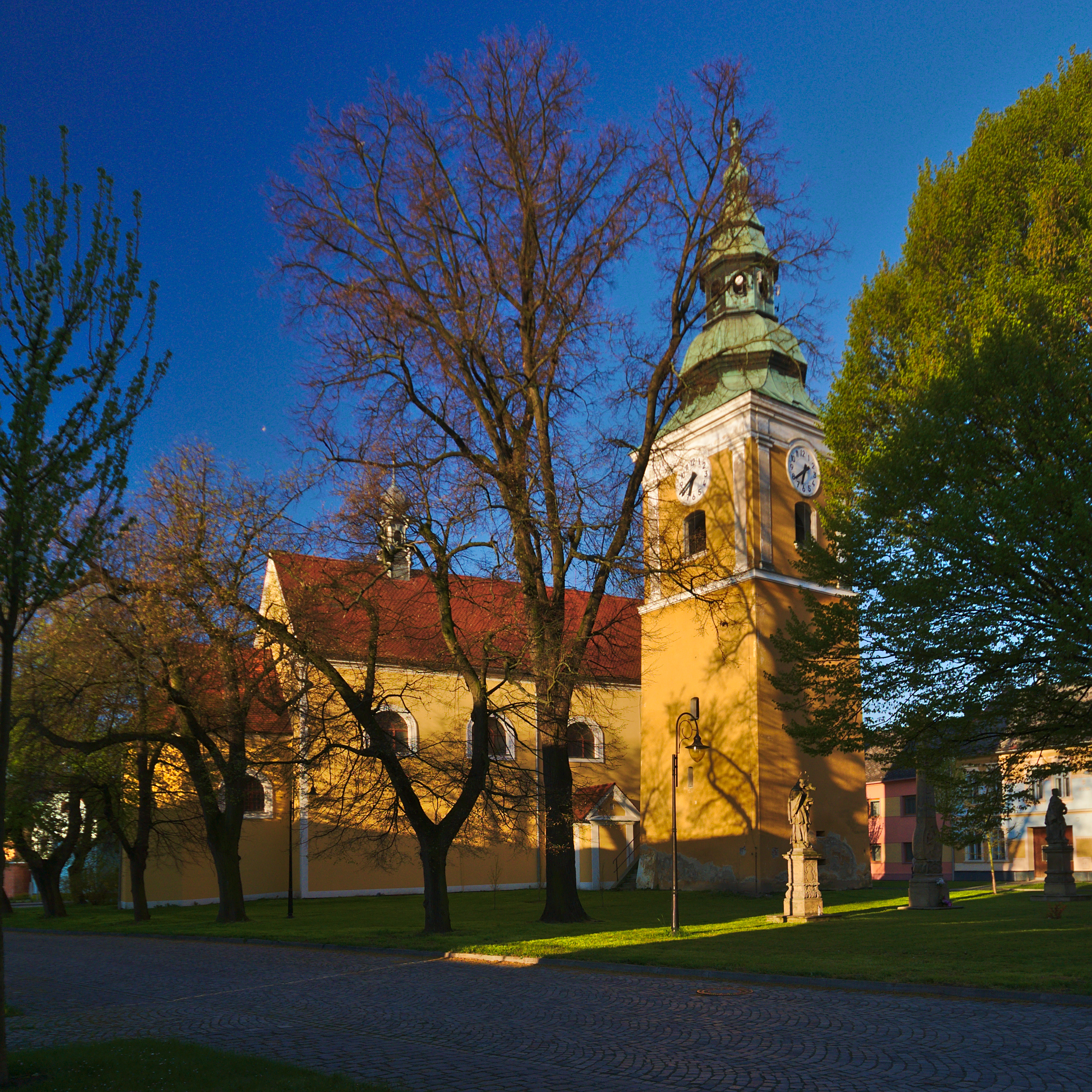 Kostel svaté Máří Magdalény, Němčice nad Hanou, okres Prostějov